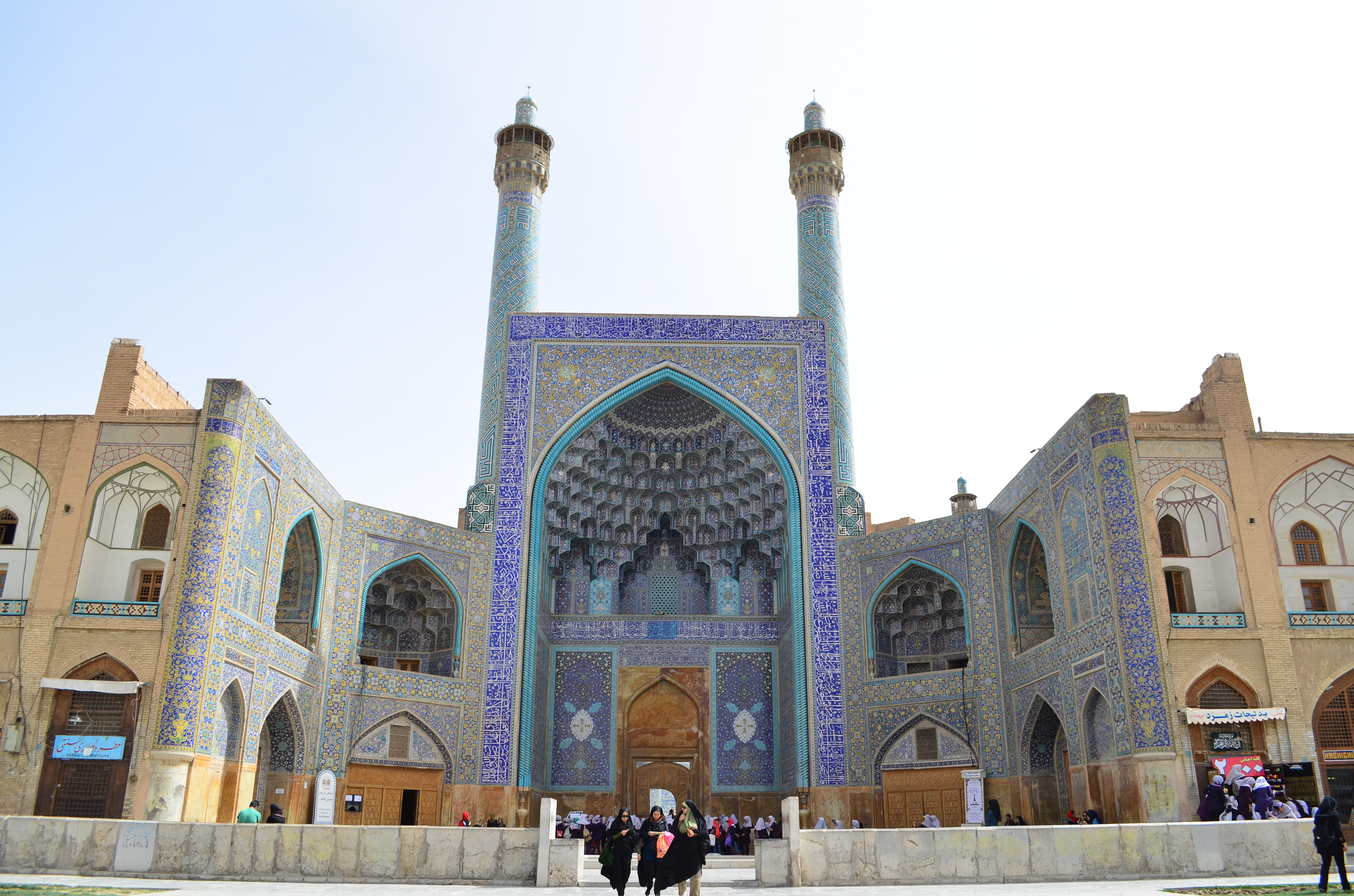 مسجد شاه، میدان نقش جهان، اصفهان، ایران